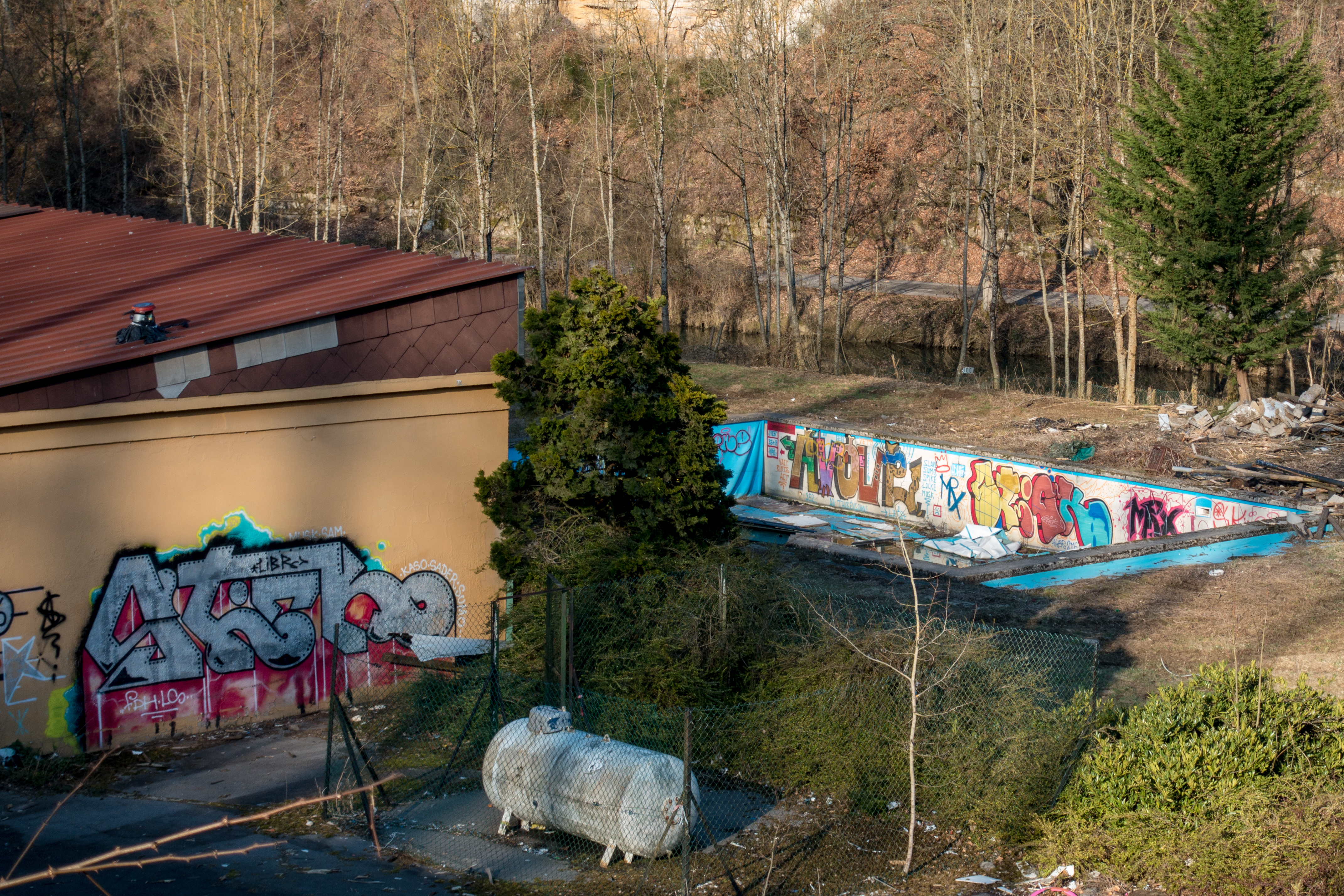 Op der Gantebeensmillen zu Izeg.